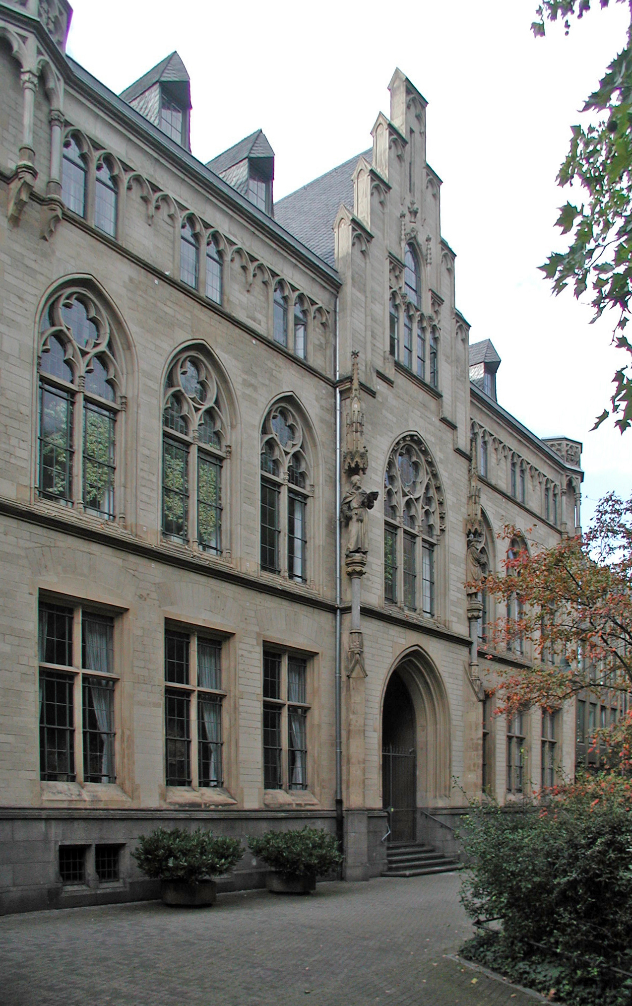 Köln, Gereonskloster 12 (ehemaliges Stadtarchiv, heute Privatbibliothek)